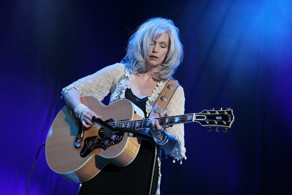 Emmylou Harris in Ahoy Rotterdam 2006, foto: C. Kuhl /